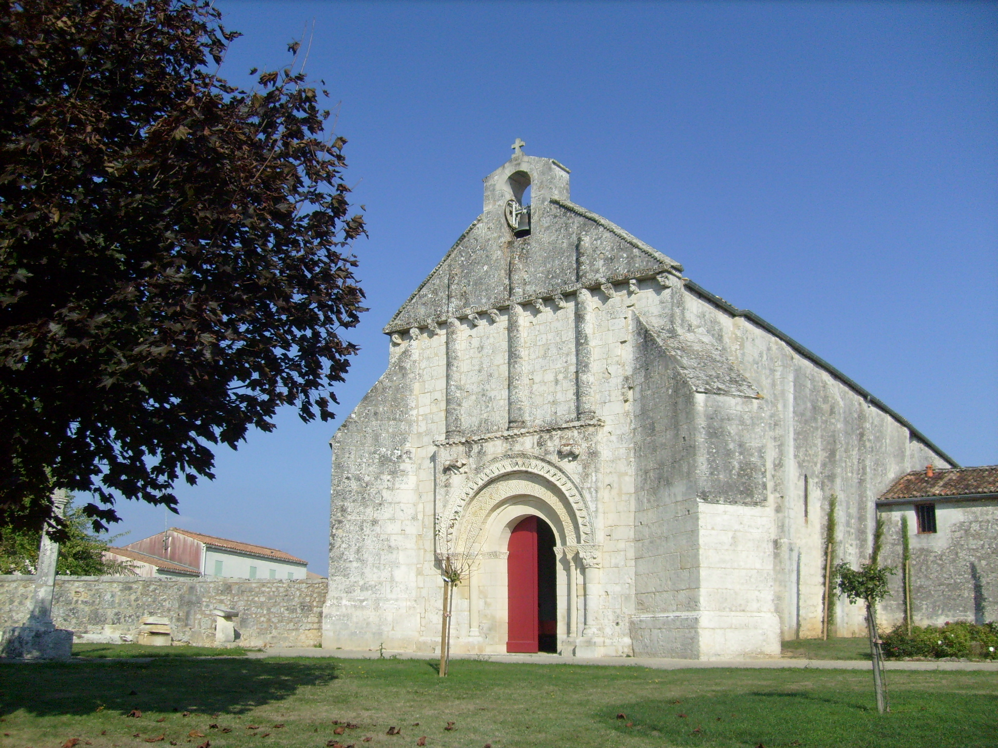 Eglise de La Clisse